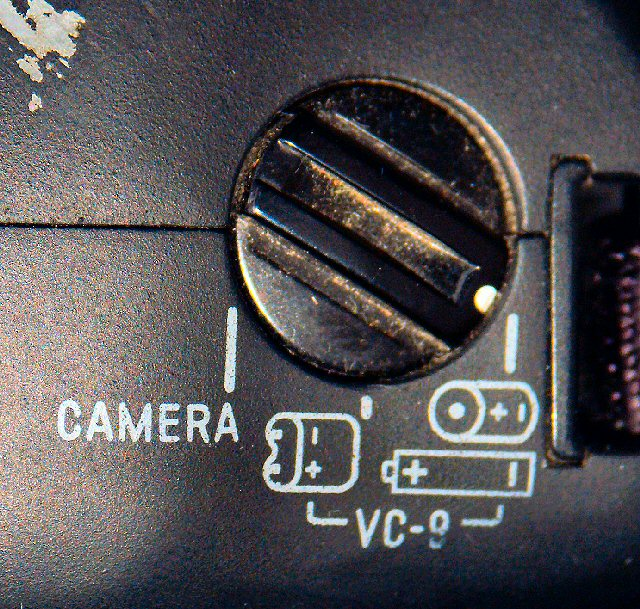 Minolta Dynax 9 - Energieversorgung: Umschalter für Stromquelle(Fotografiert mit: Minolta Dimage 7 Hi)